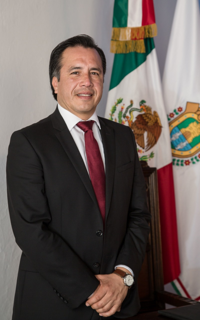 La fotografía muestra al actual Gobernador Constitucional del Estado de Veracruz, el Ingeniero Cuitláhuac García Jimenez